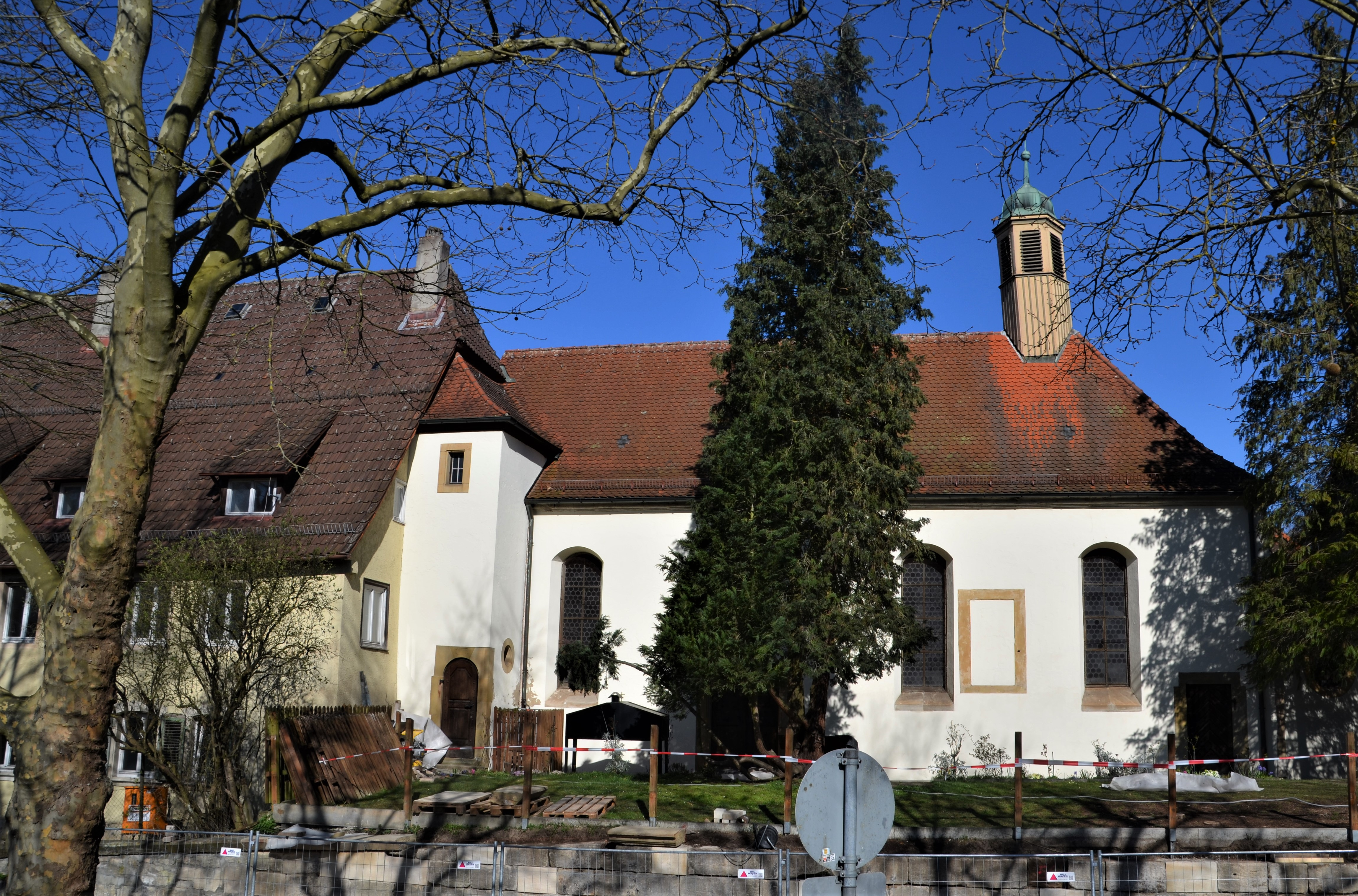 Katharinenkirche in Schwäbisch Gmünd Südfassade